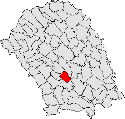 Categorie:Hărţi ale judeţului Botoşani